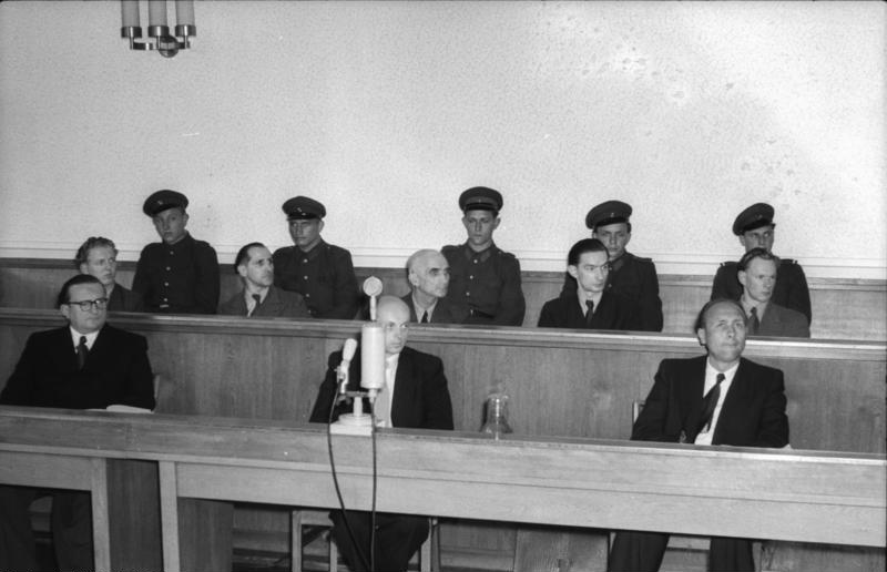 Zentralbild/Weiß 24.6.1955 Prozeß gegen Agenten vor dem Obersten Gericht Am 24.6.1955 begann vor dem Obersten Gericht der Deutschen Demokratischen Republik in Berlin ein Prozeß gegen fünf Angeklagte, die vom RIAS zur Agententätigkeit für Spionageorganisationen angeworben wurden. UBz:(v.r.n.. Mitte) Die Angeklagten Joachim Wiebach, Richard Baier, Günter Krause, Willi Gast und Manfred Vogt ( 2. Reihe).